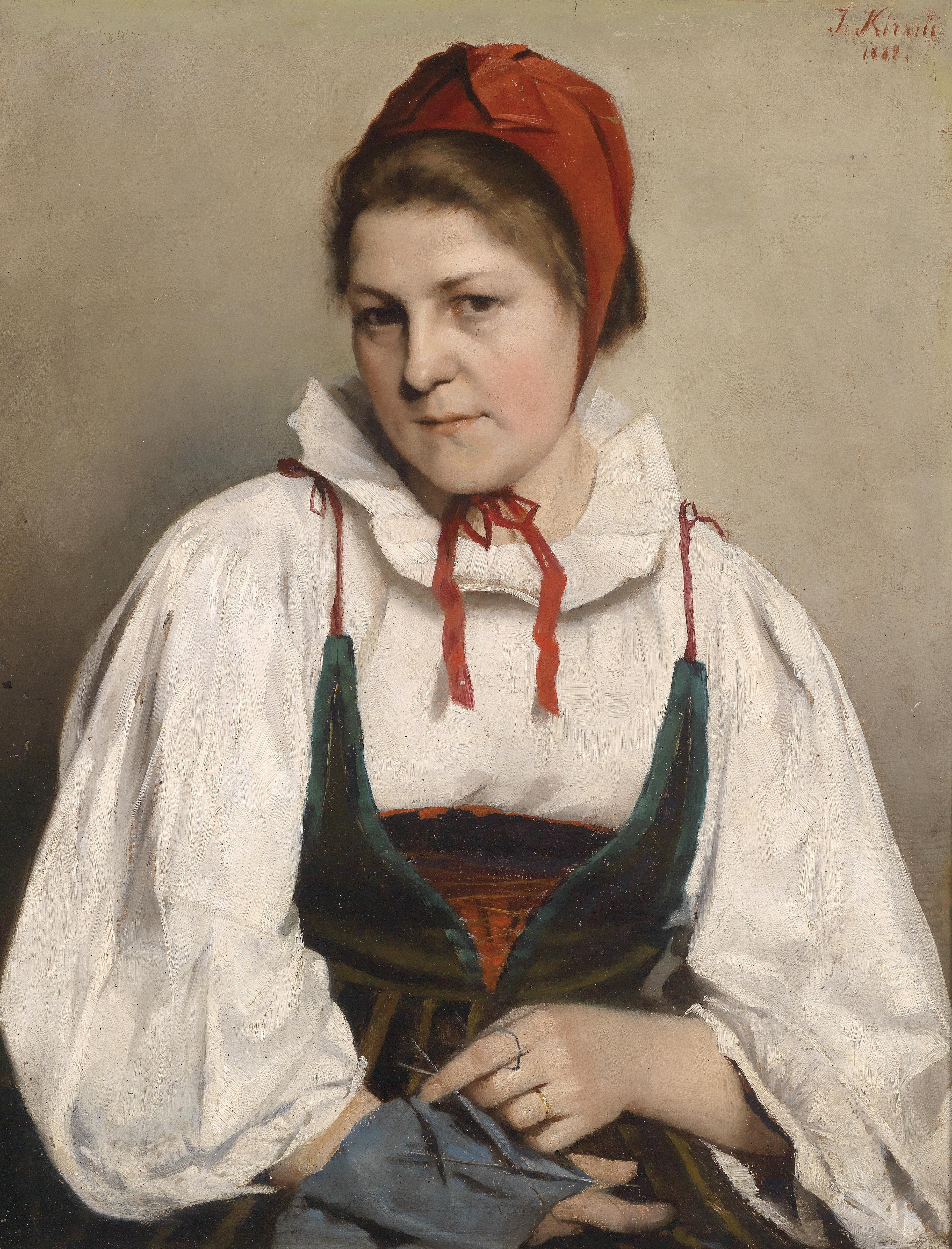 Strickendes Mädchen, signiert, datiert J. Kirsch 1889, Öl auf Karton, 73 x 57 cm